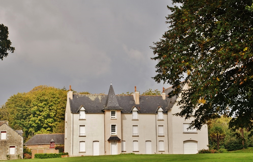 Le Château